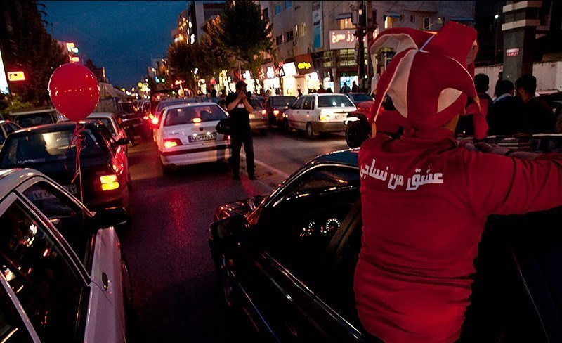 مازِرونی: مازندرون نساجی ِصعود په جشن، شاهی شهر دله